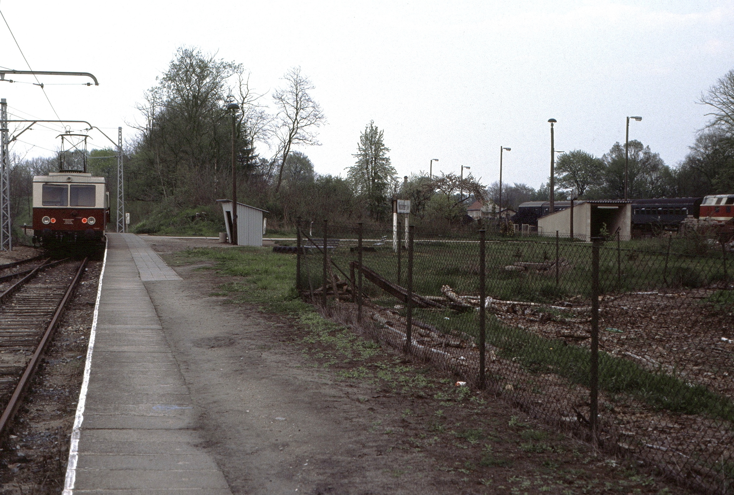 Kleinbahnhof Müncheberg (Mark)